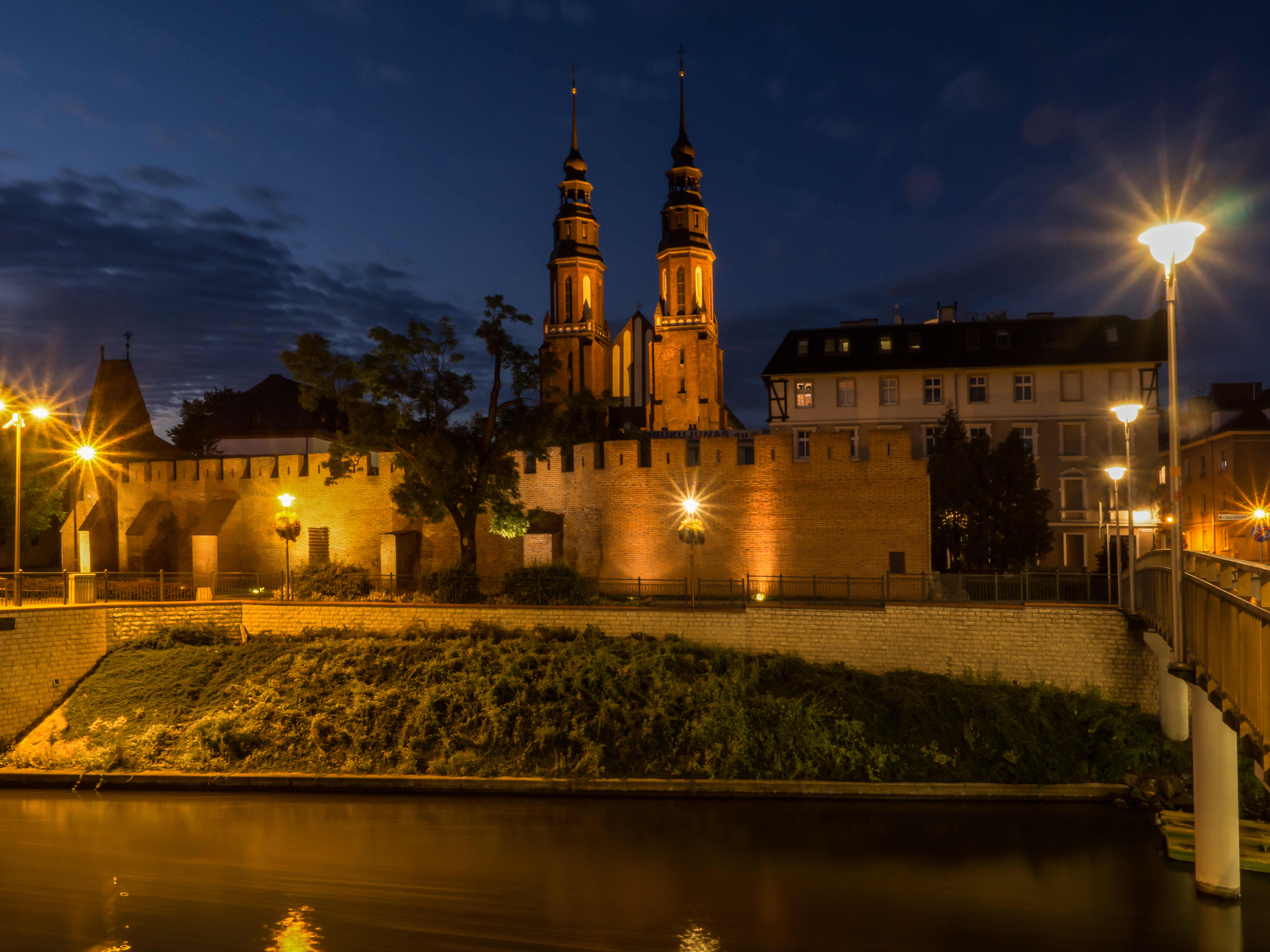 Opole, mury obronne, 1300, XVI, XIX